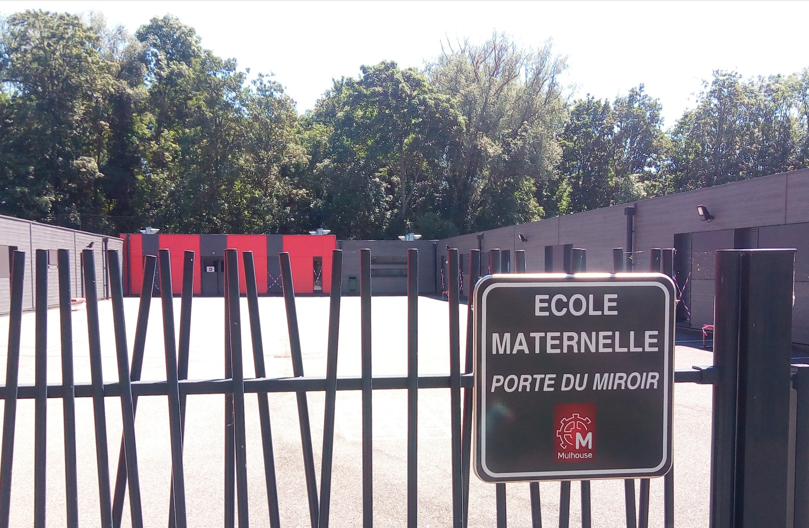 L'école maternelle Porte du Miroir occupait les locaux de l'école Illberg jusqu'en 2018